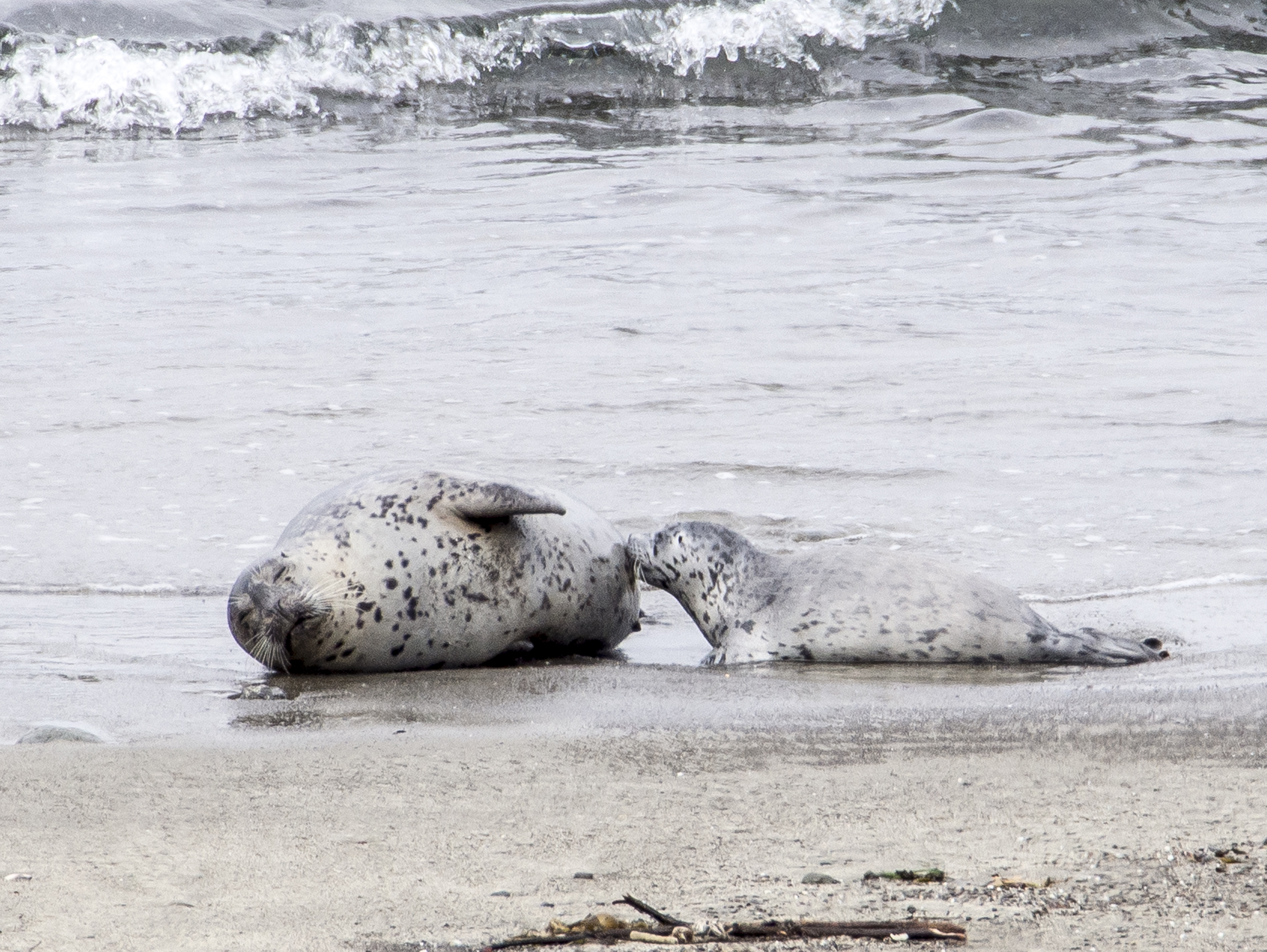 MacKerricher State Park